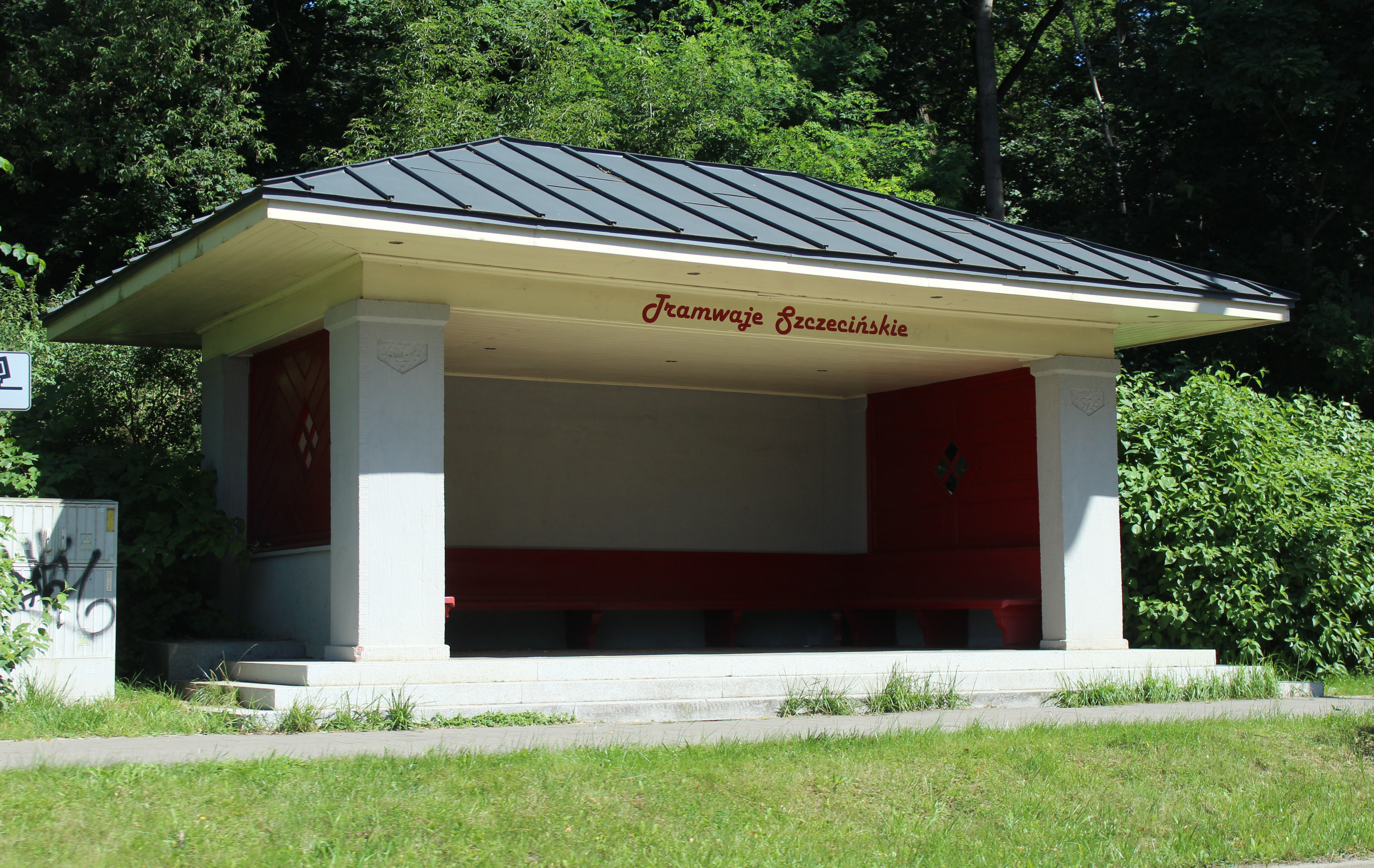 Przedwojenna wiata przystanku tramwajowego przy ul. Arkońskiej w Szczecinie